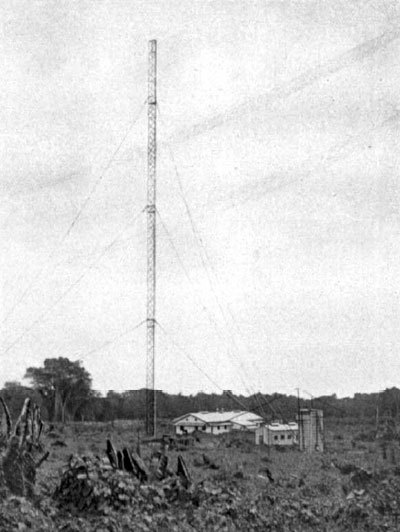 Telefunkenstation Apia